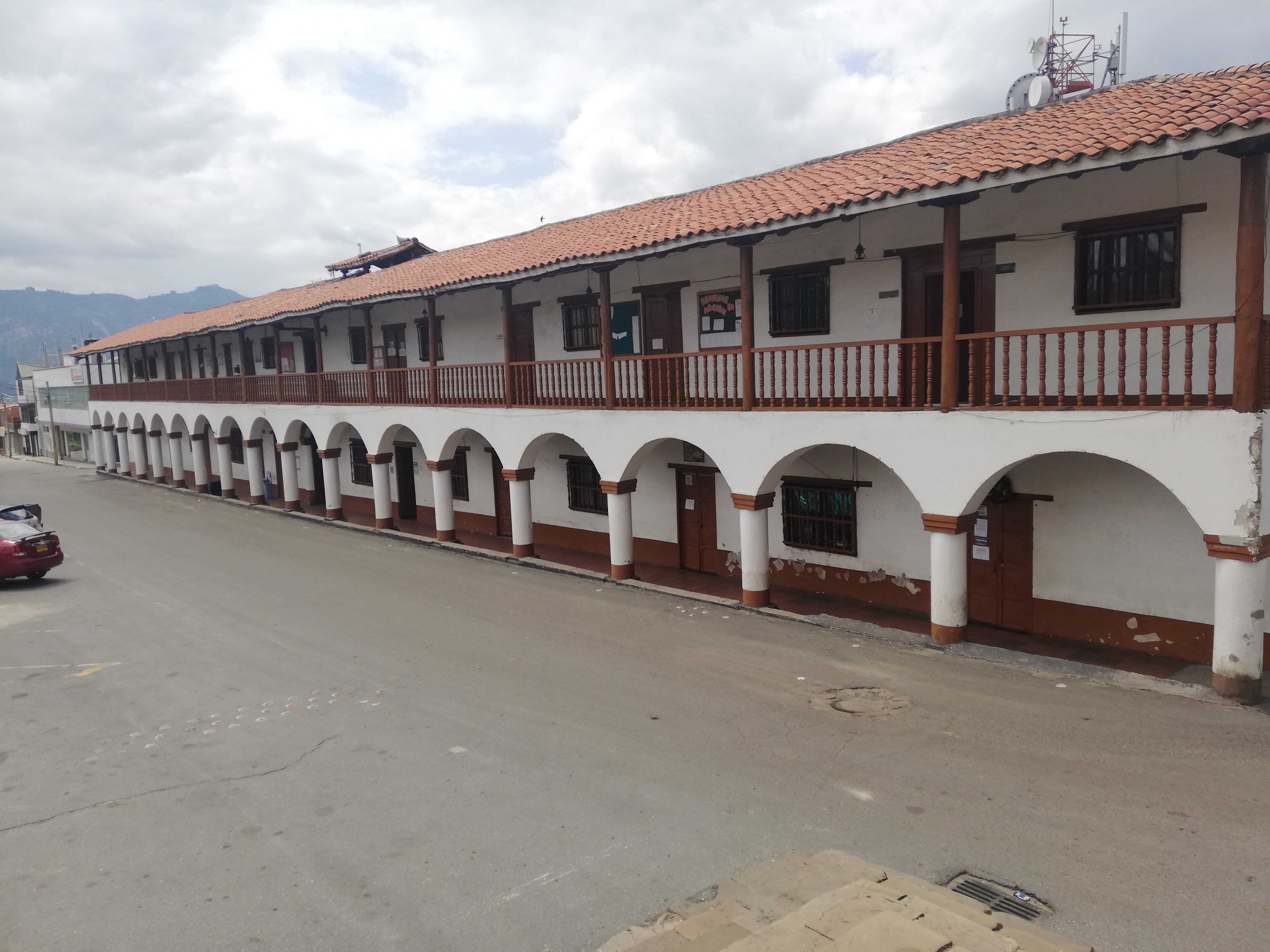 palacio de la consistorial sede de la alcaldía de socha